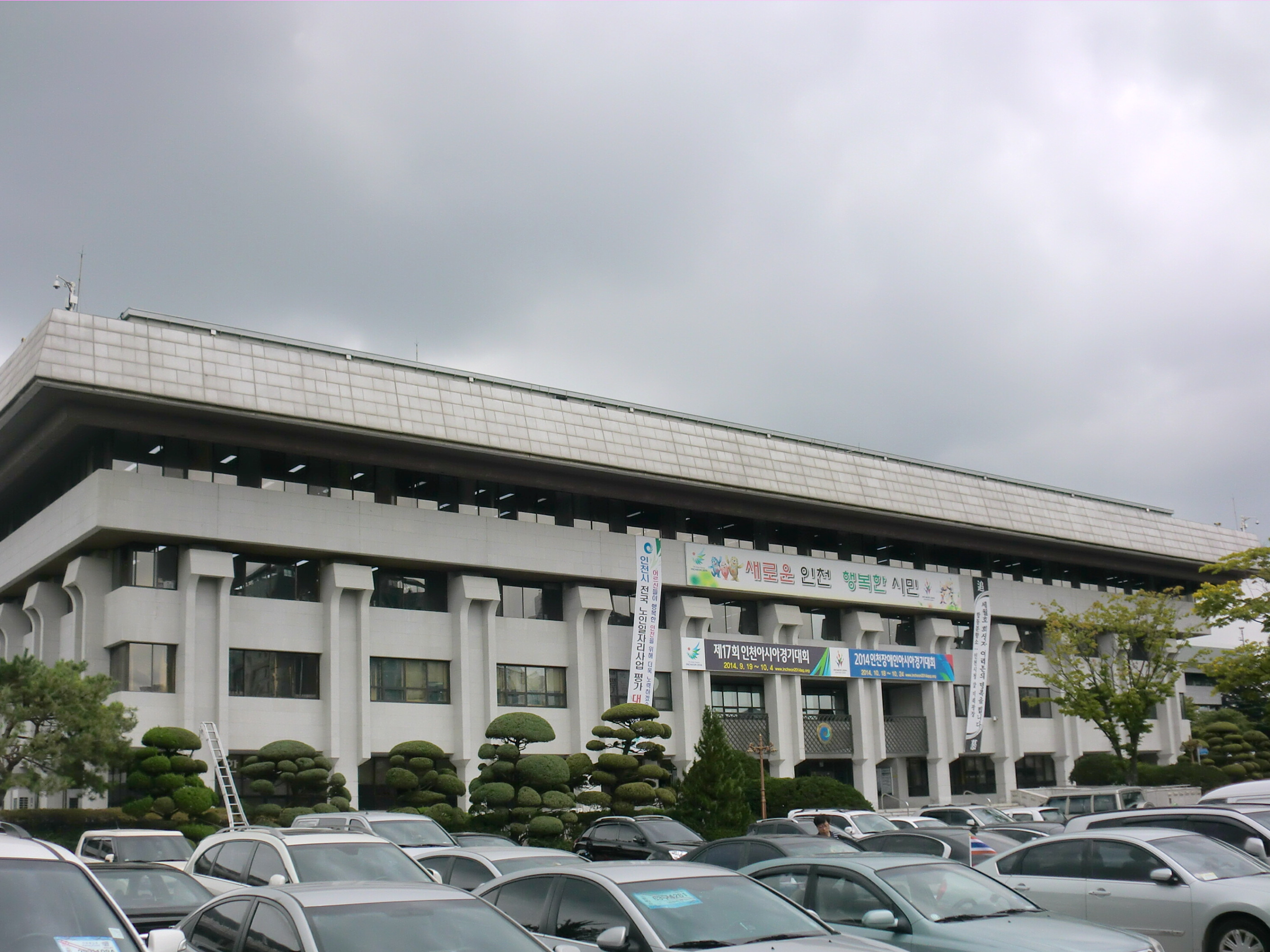 인천광역시 남동구에 있는 인천광역시청